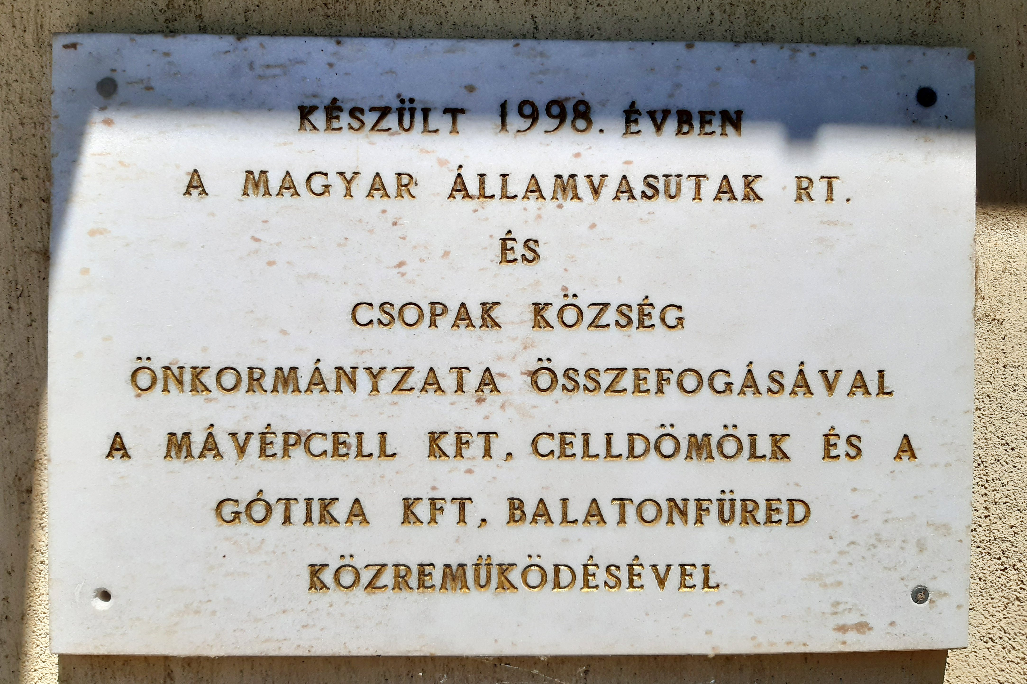 Csopak vasúti megállóhely emléktáblája